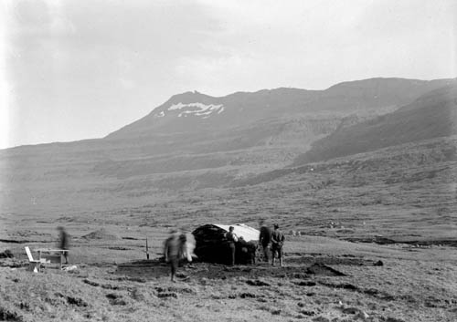 Syðrugøta, millum Fjarða, Faroe Islands